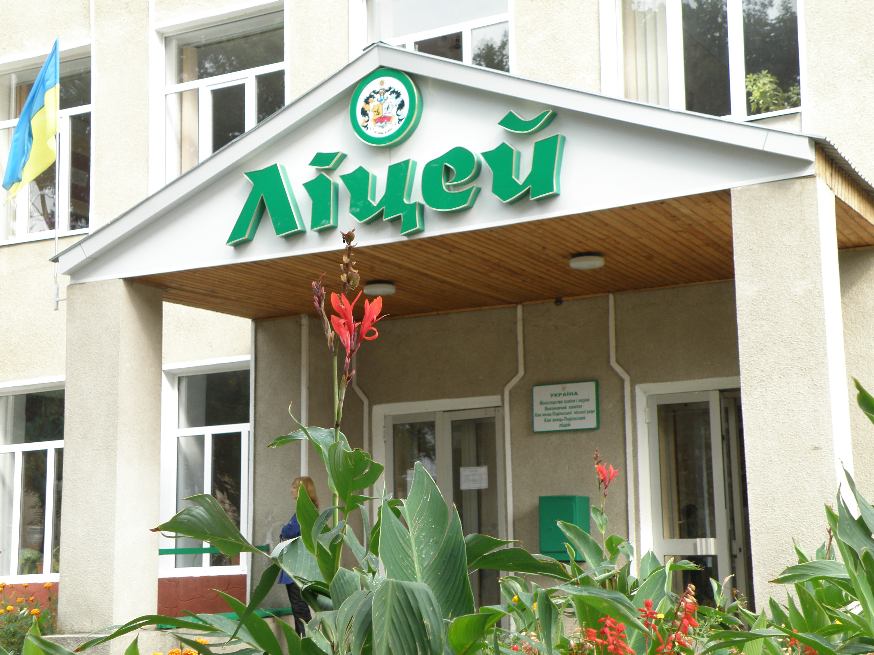 Будівля Кам'янець-Подільського ліцею